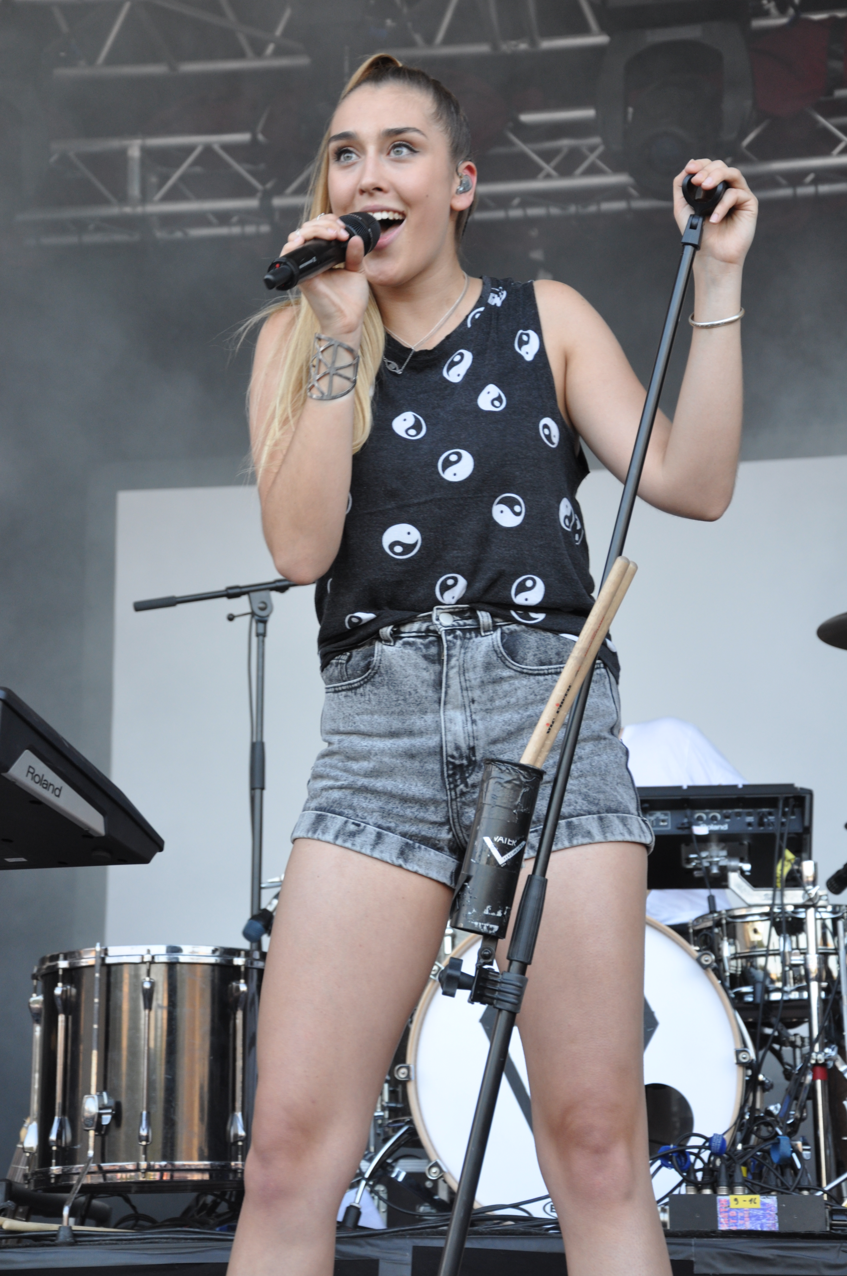 Oben Ohne 2014